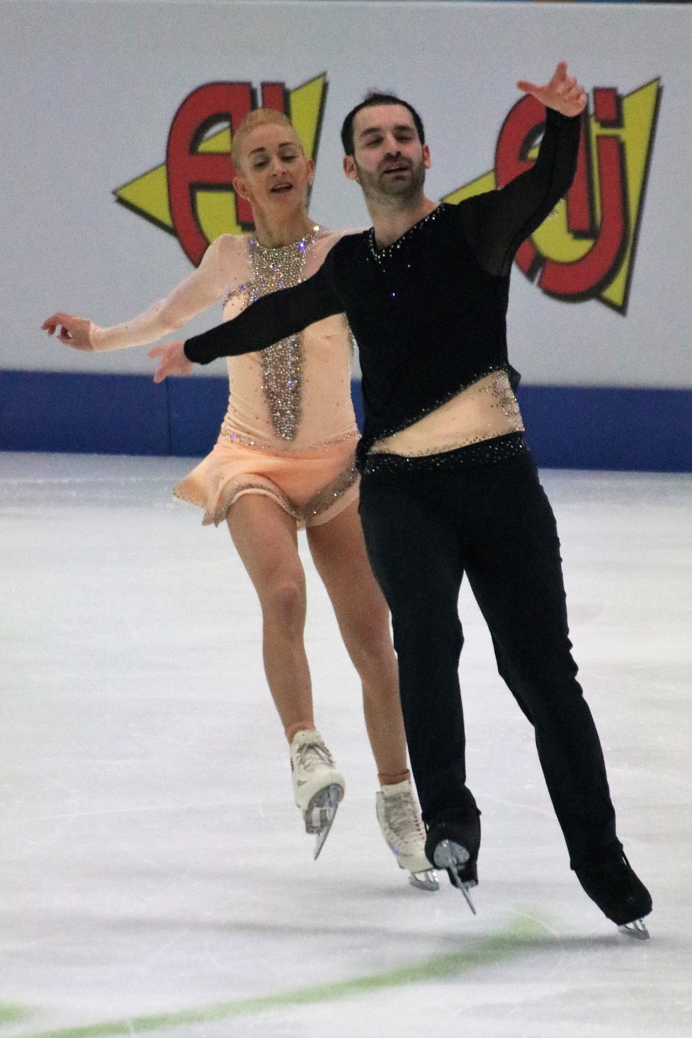 Зои Джонс и Кристофер Бояджи (Великобритания) на чемпионате Европы по фигурному катанию 2020